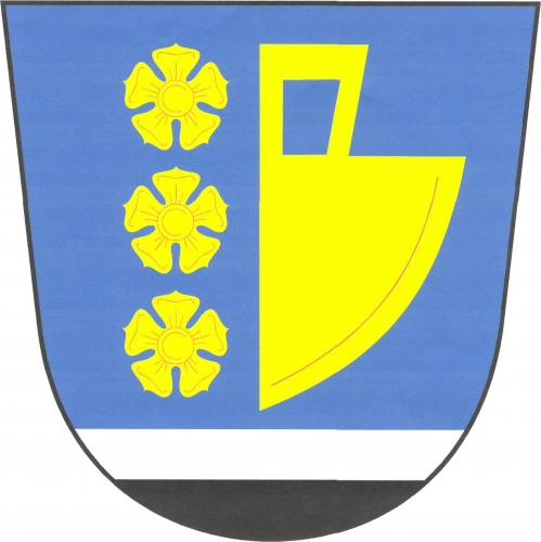 znak, Víska u Jevíčka, okres Svitavy